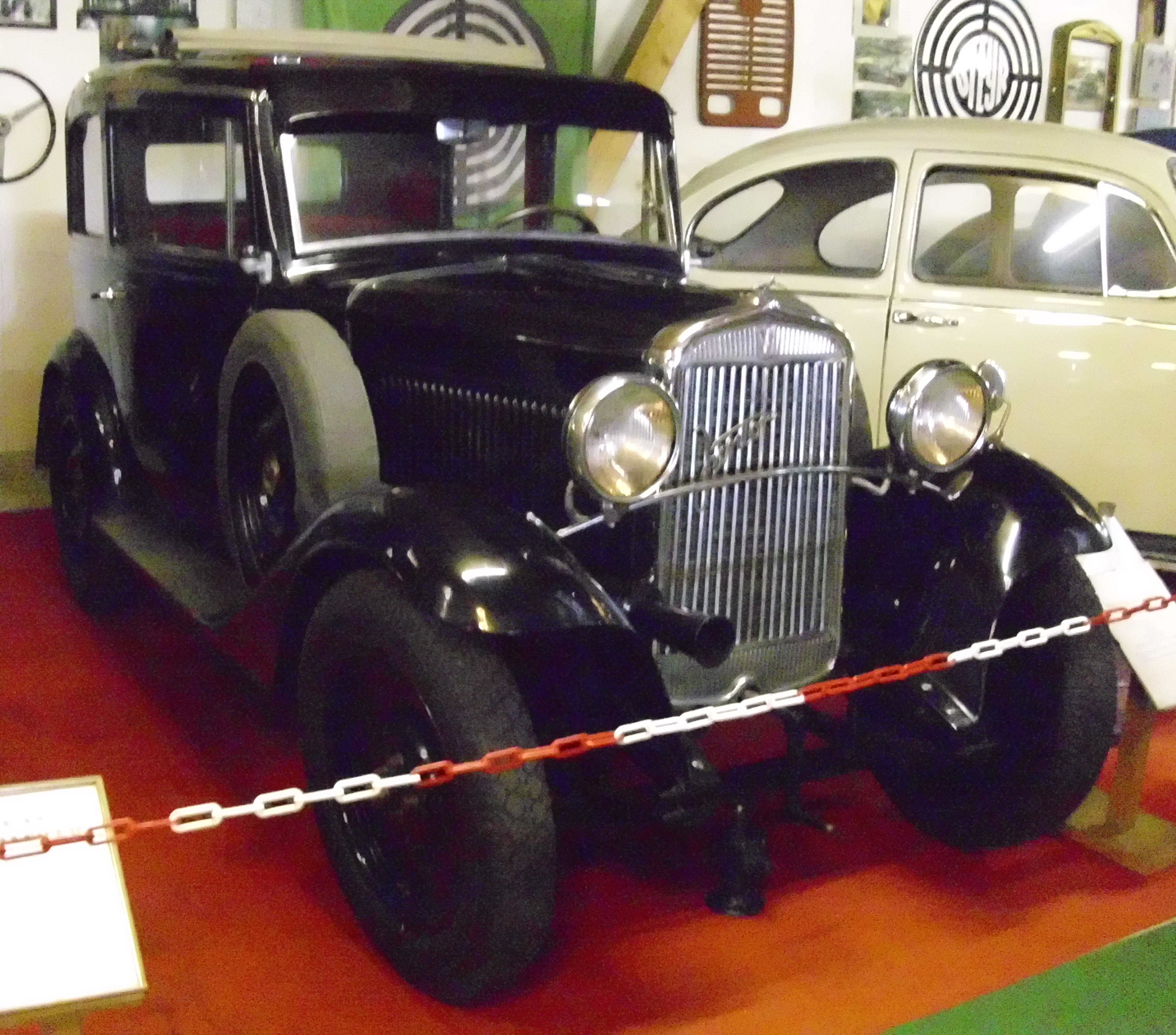 Walter Junior S 1934-1937